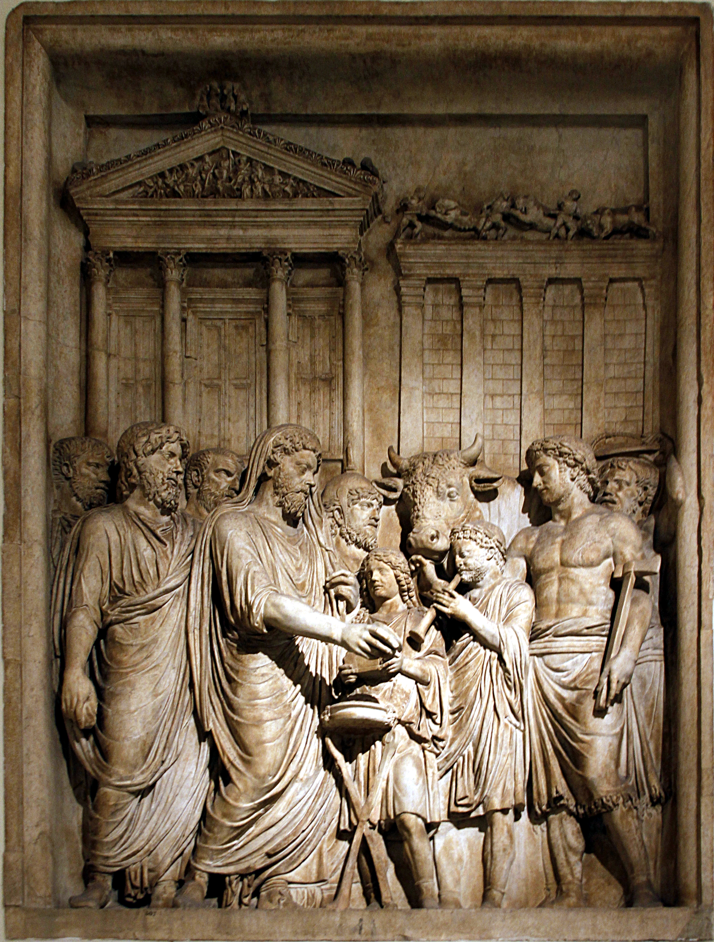 Musei Capitolini - Rome